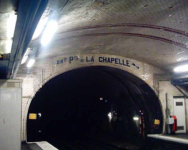 Tunnel Nord de la station des Abbesses du Métropolitain de Paris.